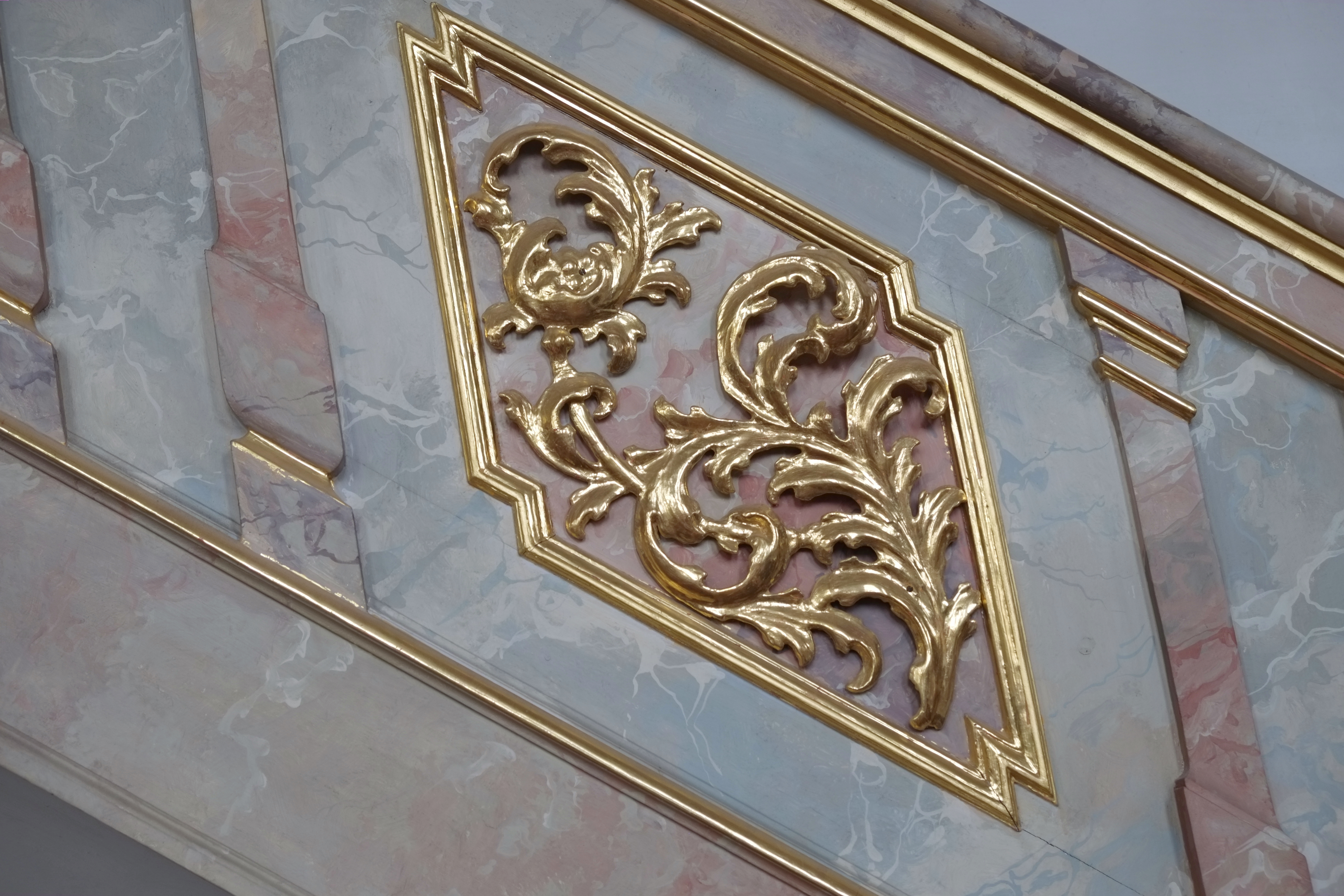 Katholische Pfarrkirche St. Nikolaus in Stadtbergen im Landkreis Augsburg (Bayern, Deutschland)